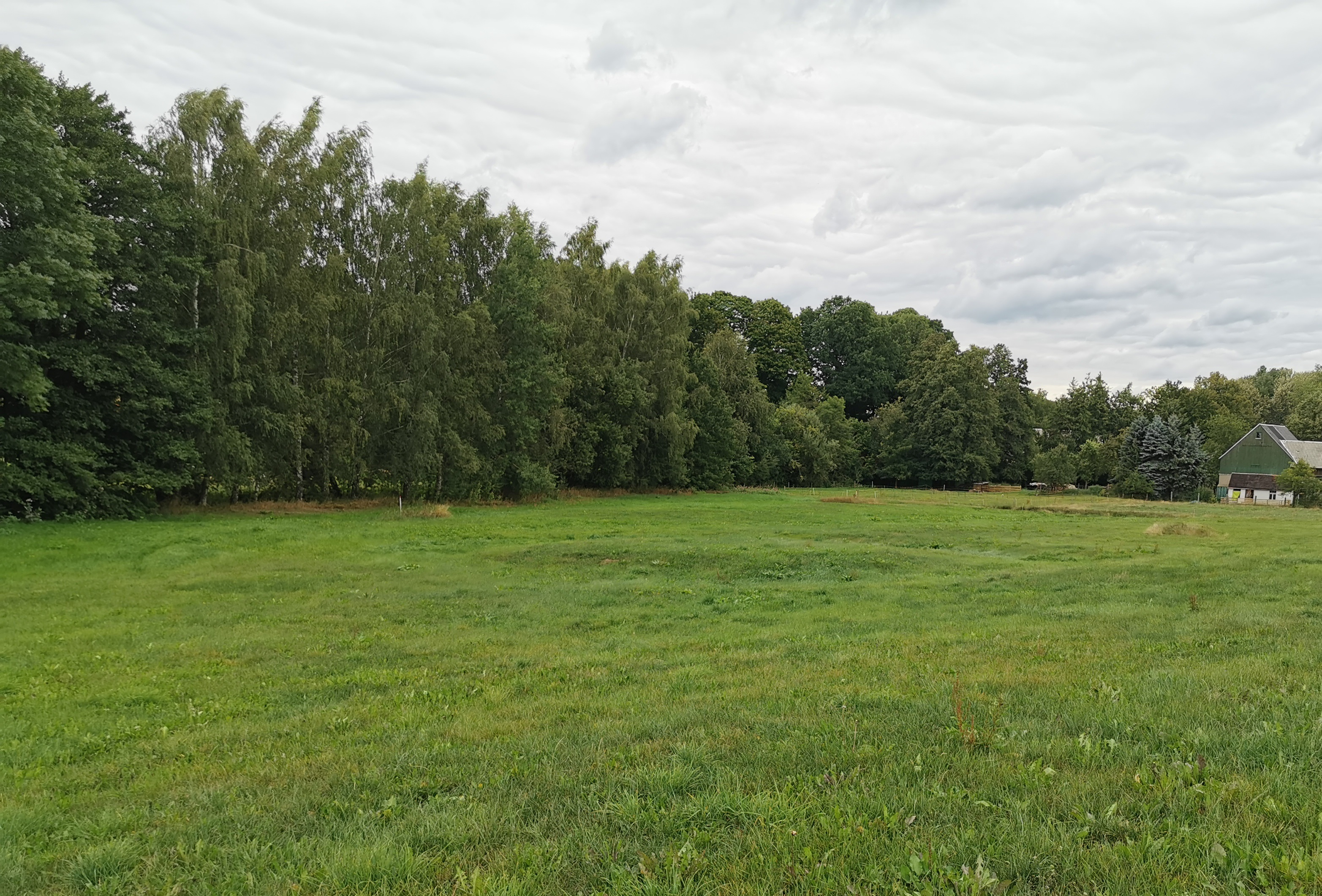 Aufnahme der mittelalterlichen Wasserburg